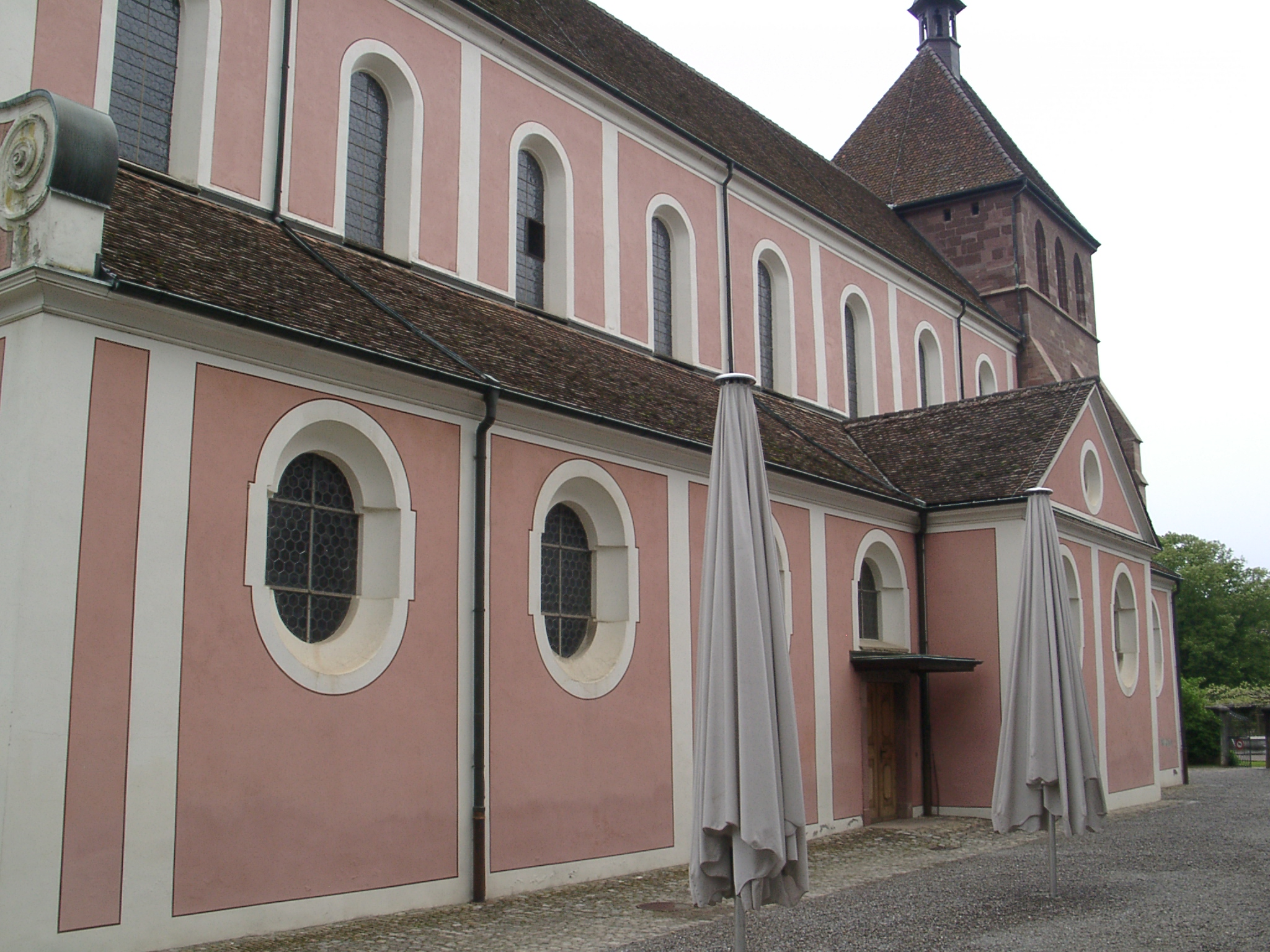 Zurzach, Verenamünster